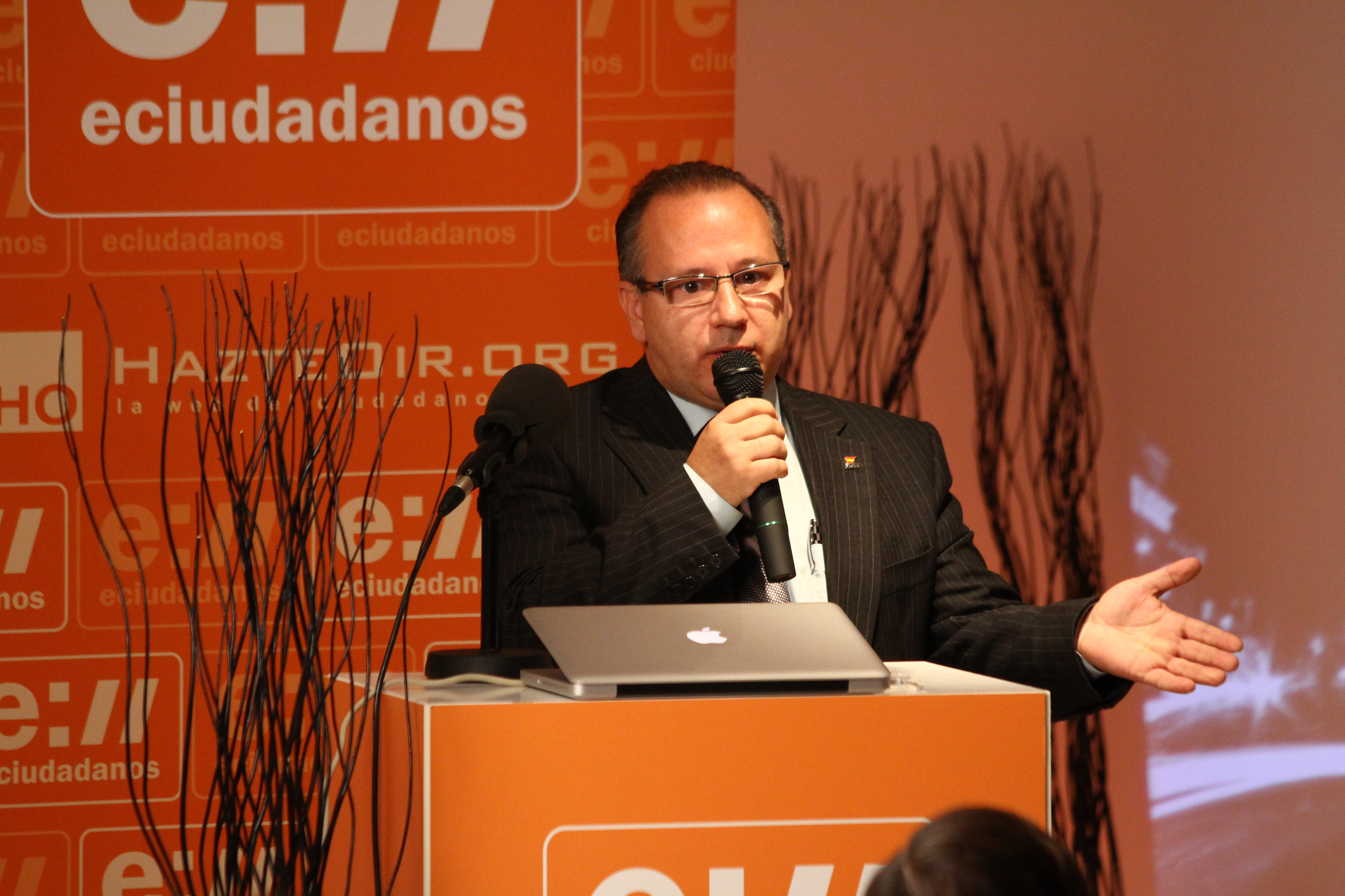 Intervención de Francisco José Alcaraz, presidente de la plataforma Voces contra el Terrorismo.